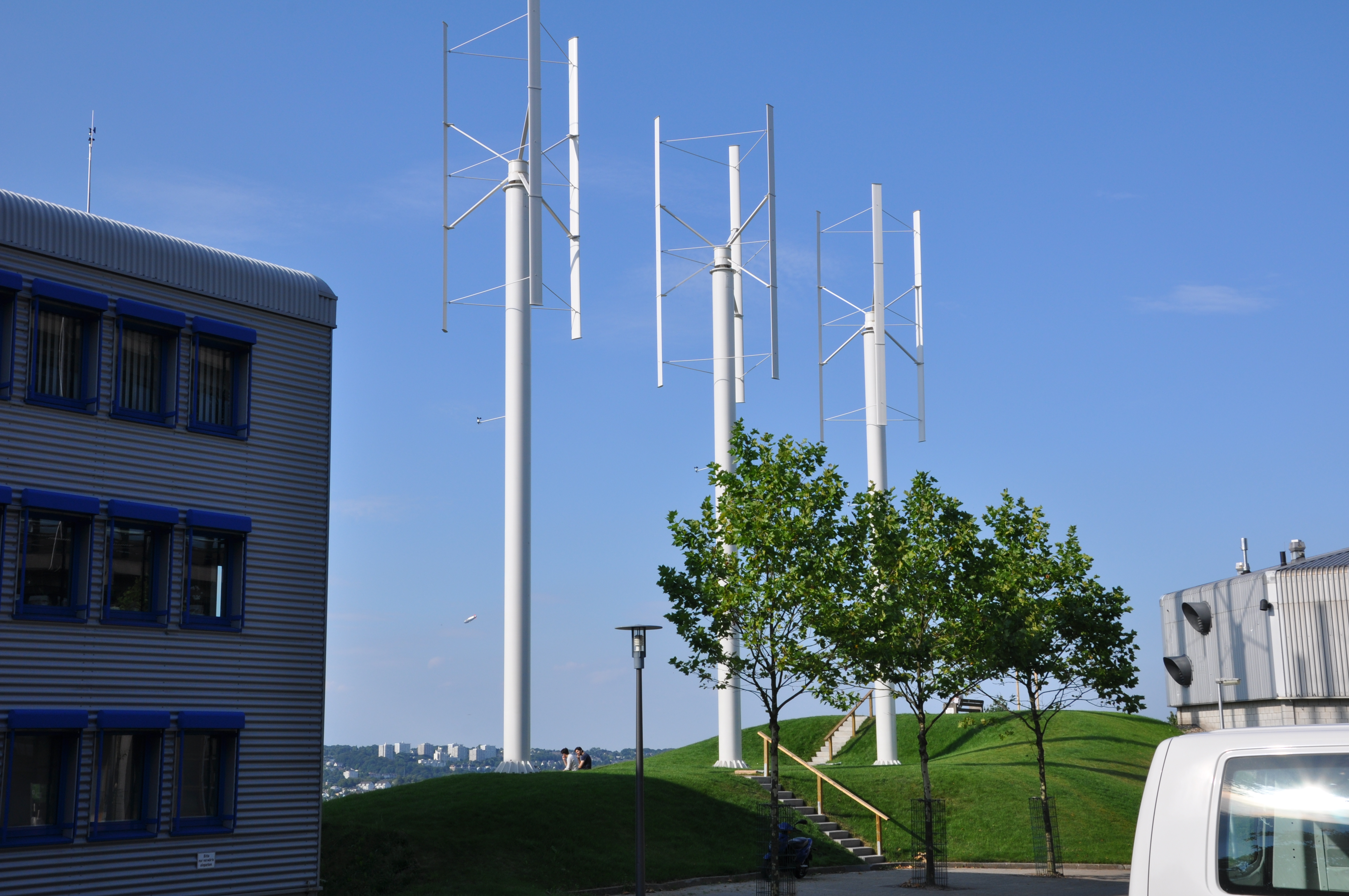 Gaußstraße, Wuppertal, Bergische Universität Wuppertal, Campus Grifflenberg